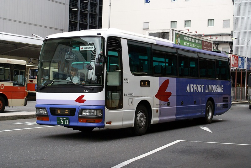 事業者: 広島電鉄 陸運登録: 広島200か・512 シャーシ: いすゞ自動車 KL-LV774R2 車体: いすゞバス製造 年式: 2003年 撮影場所: 広島バスセンター